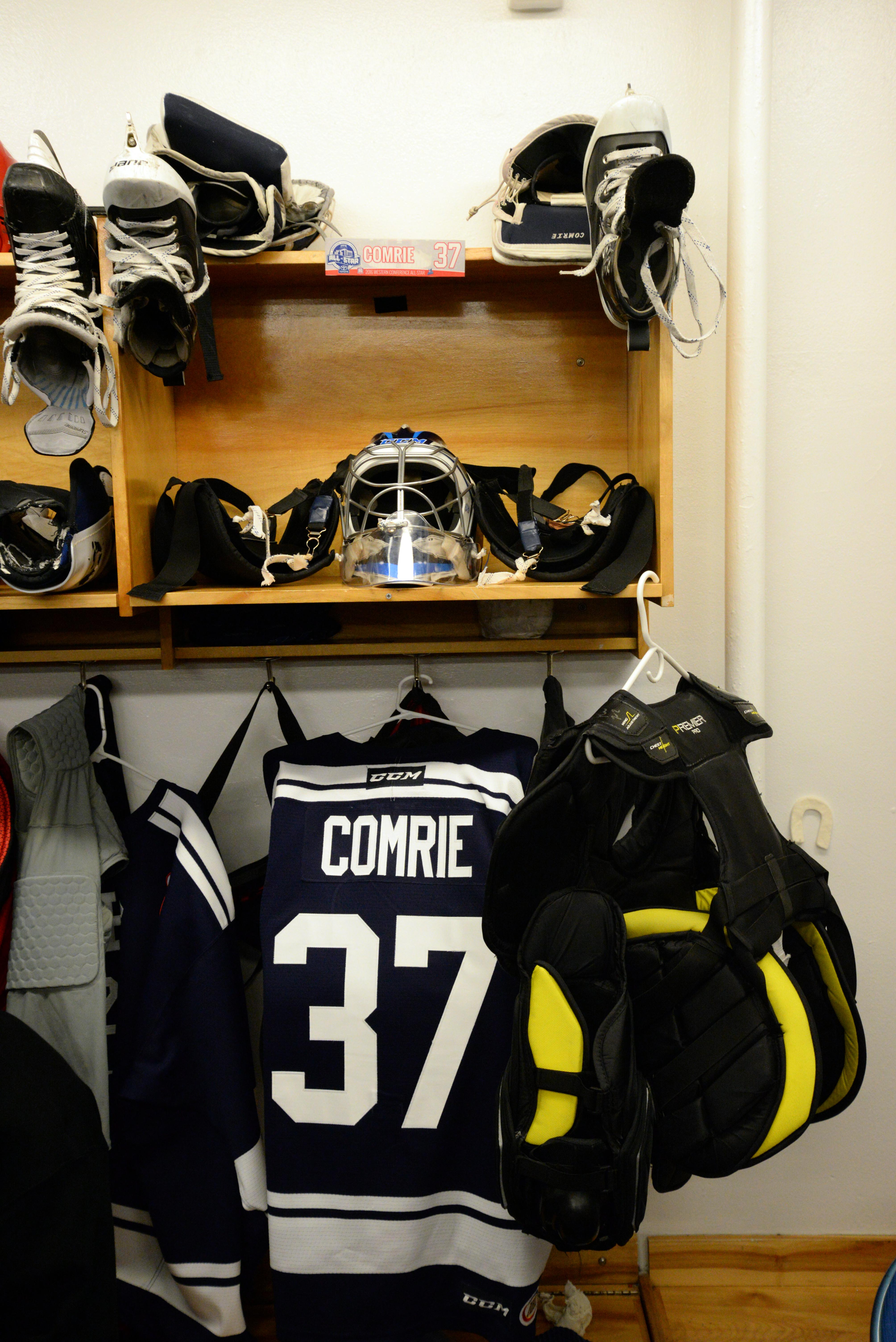 EPP_8606